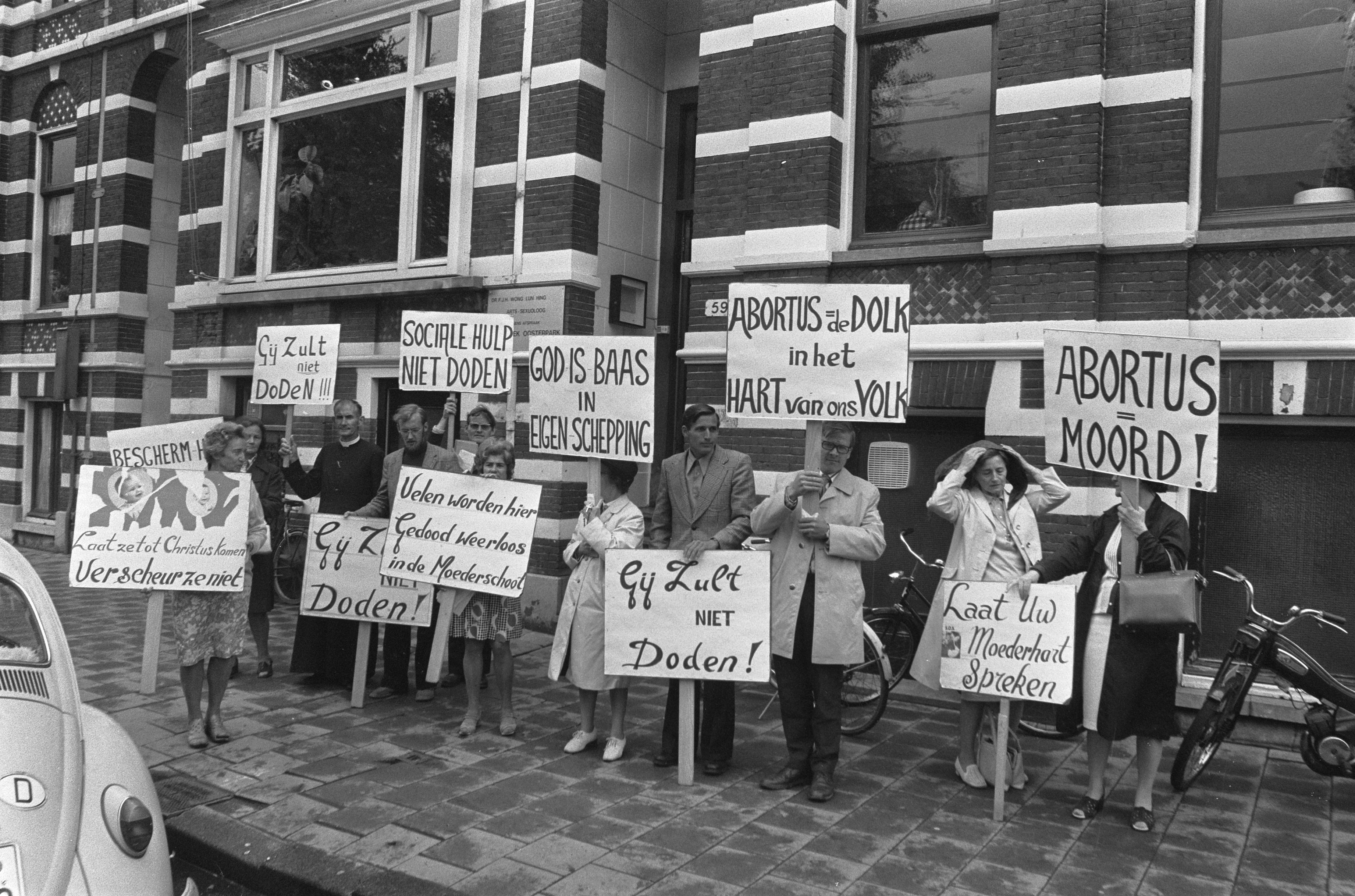 Collectie / Archief : Fotocollectie Anefo Reportage / Serie : [ onbekend ] Beschrijving : Anti-abortusdemonstratie bij abortuskliniek Oosterpark van dr. Wong in Amsterdam Datum : 27 augustus 1974 Locatie : Amsterdam, Noord-Holland Trefwoorden : demonstraties Persoonsnaam : OOSTERPARK Fotograaf : Punt, […] / Anefo Auteursrechthebbende : Nationaal Archief Materiaalsoort : Negatief (zwart/wit) Nummer archiefinventaris : bekijk toegang 2.24.01.05 Bestanddeelnummer : 927-4133